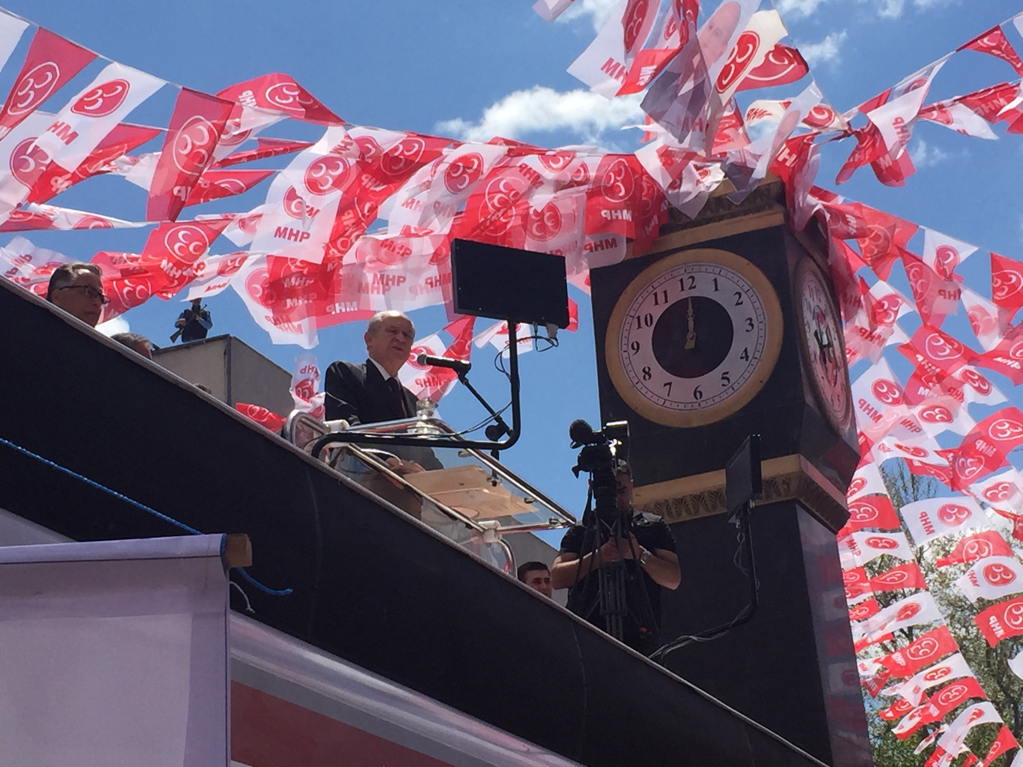 Chairman of Nationalist Movement Party, Devlet Bahçeli at the Ankara rally